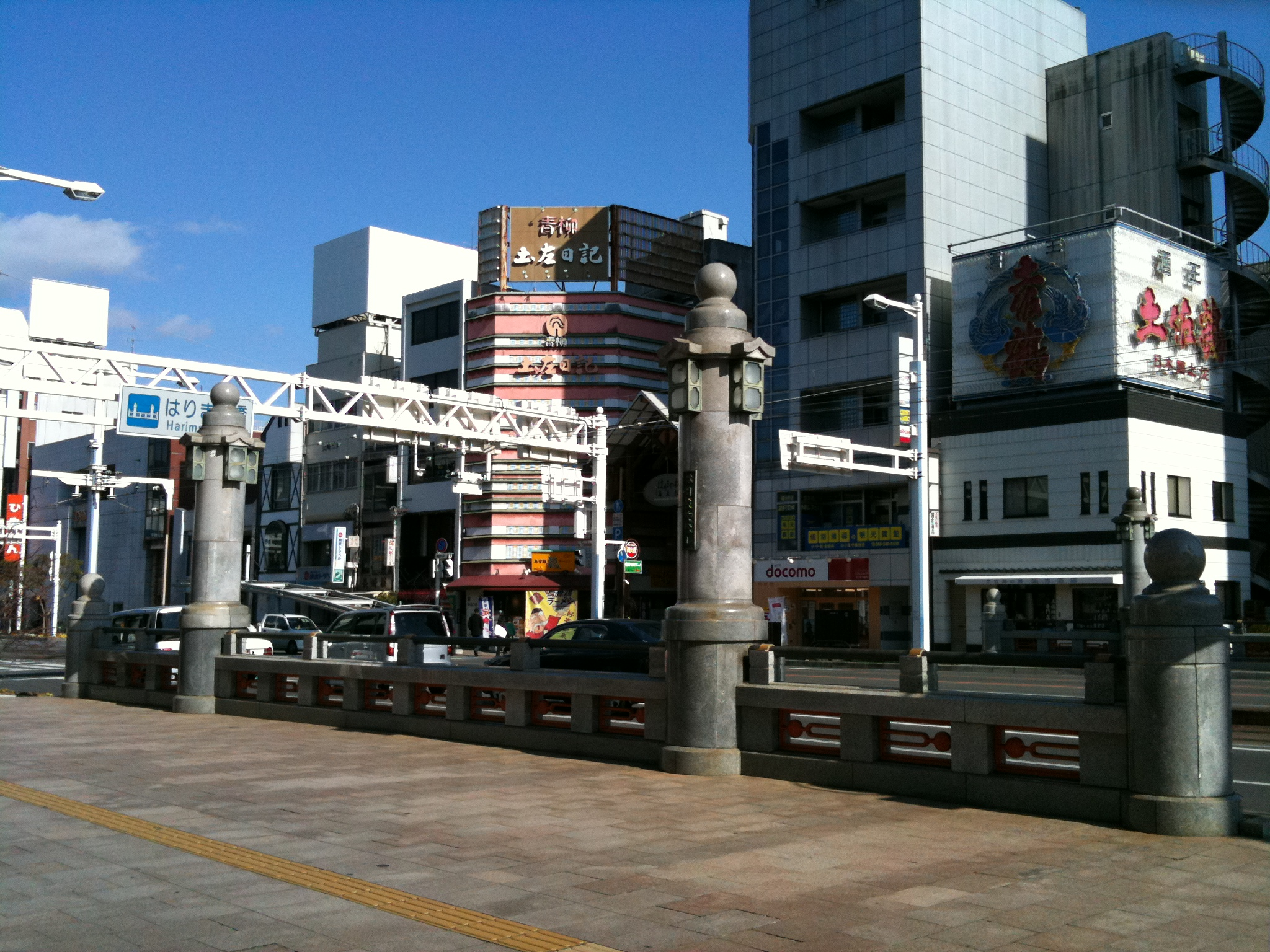 はりまや橋（高知県高知市） 車道の欄干